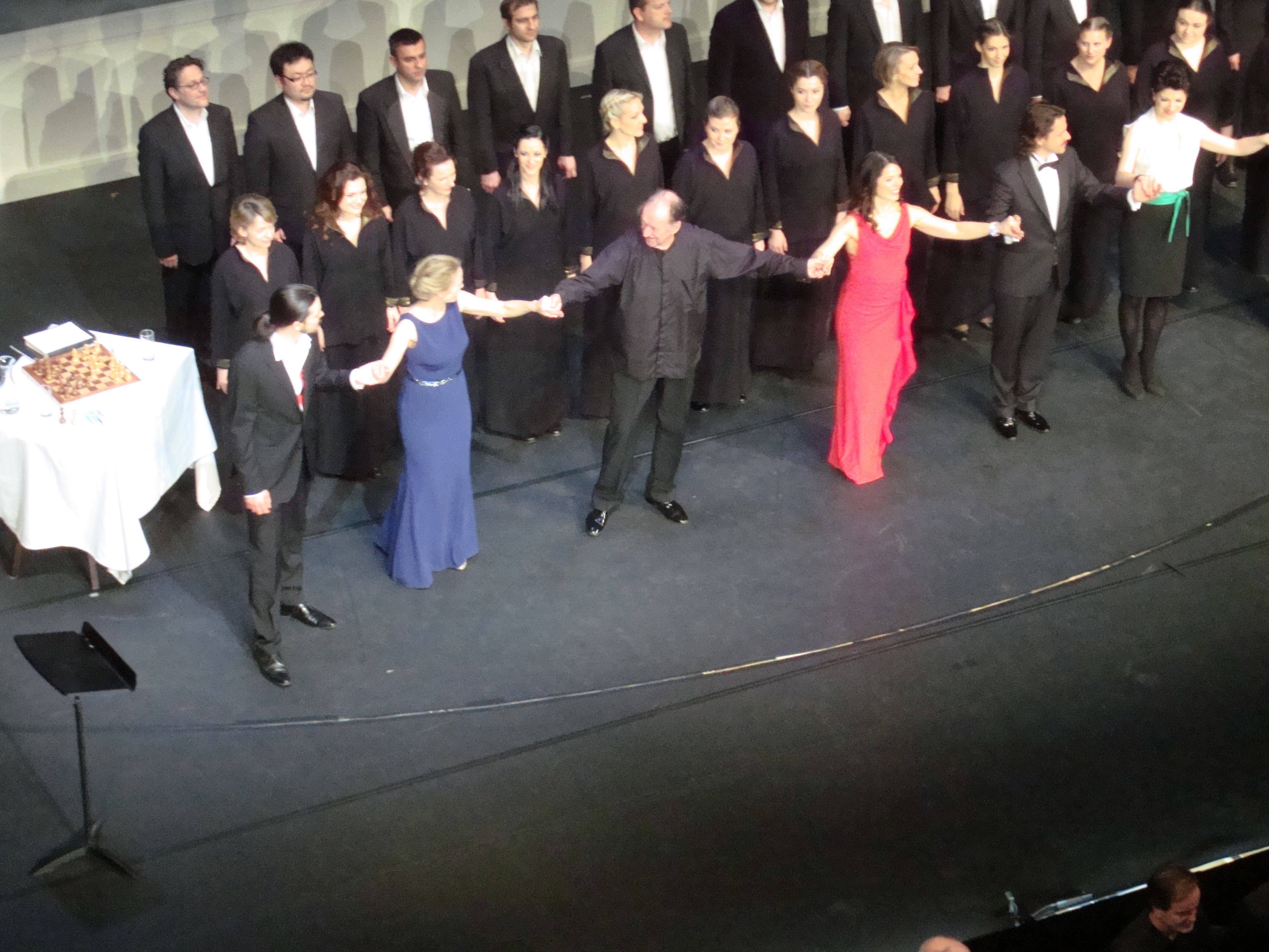 Harnoncourt Così Applaus 2 lady in red (sung 'Despina'): Elisabeth Kulman.